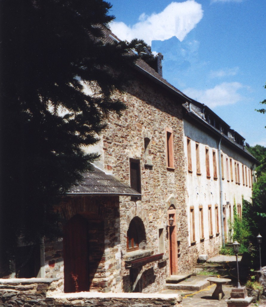 Ehemaliges Haus Pallandt